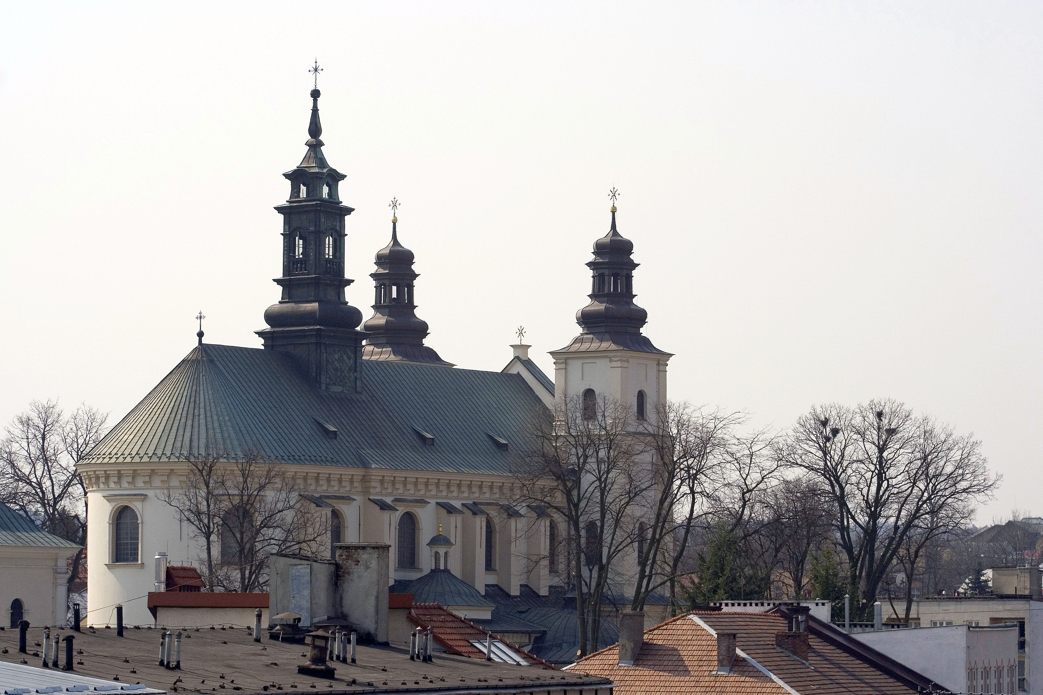 Kościół parafialny pw. Przemienienia Pańskiego w Brzozowie, widok z wieży ratusza.